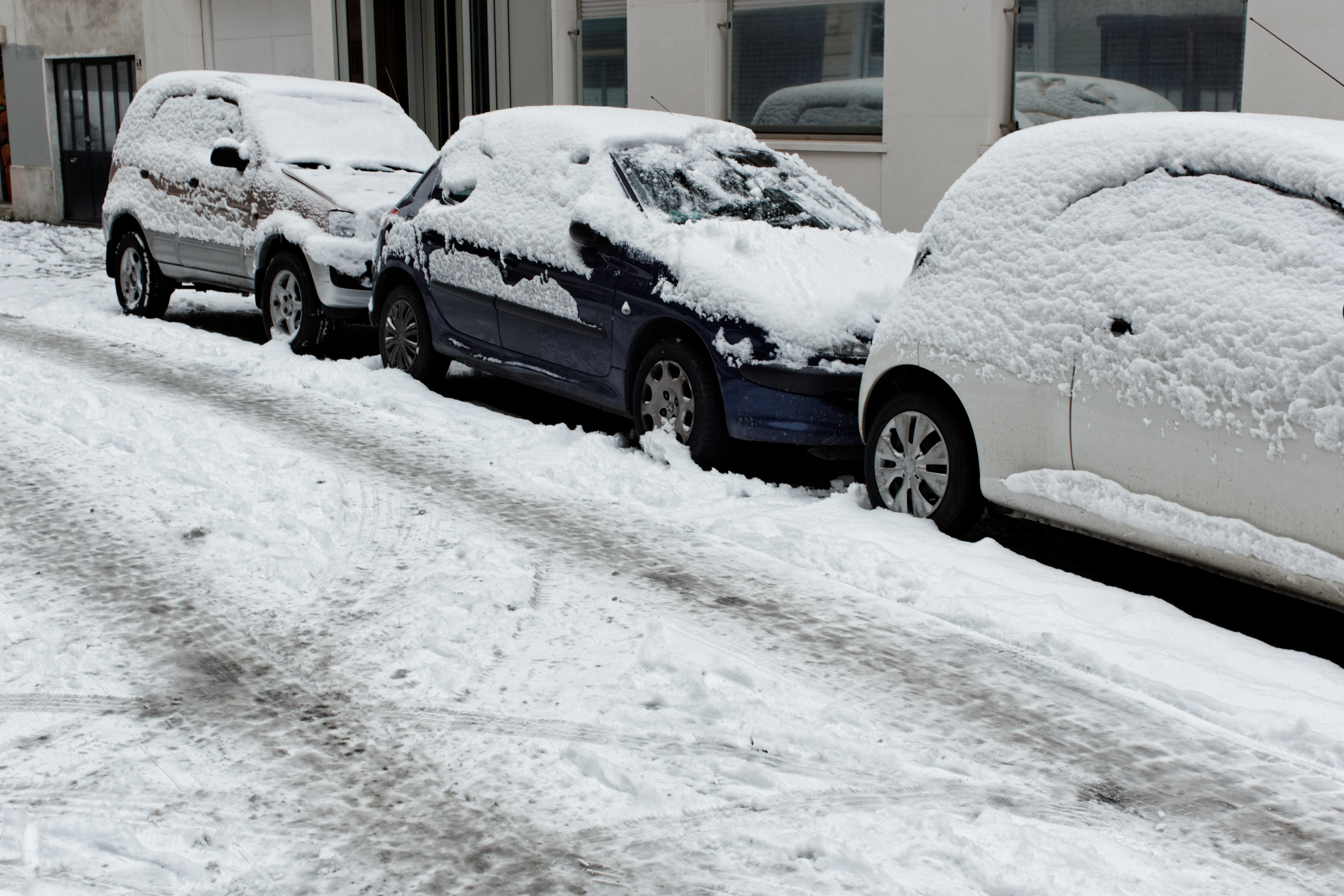 Voitures en stationnement rue du Repos (Paris), sous la neige.